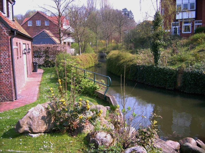 Scharmbecker Bach in Osterholz-Scharmbeck. Photographiert im April 2005.